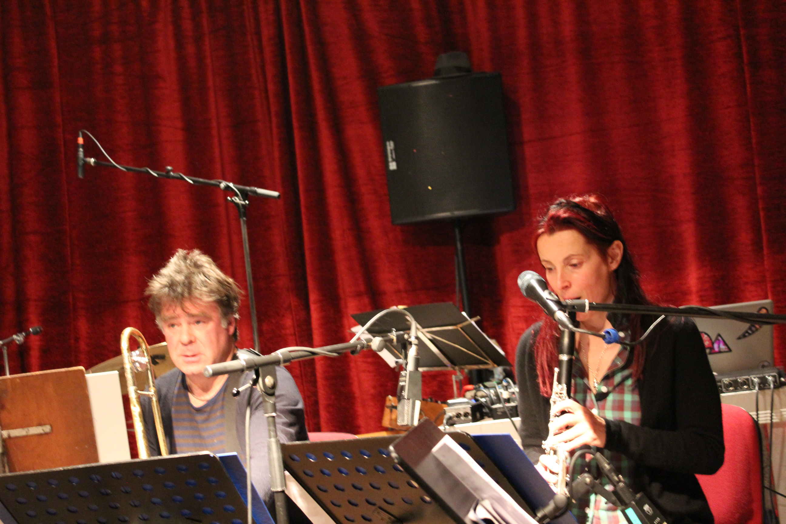 Walter Wierbos und Isabelle Duthoit auf dem SWR NEWJazz Meeting im Kölner Loft: „hübsch acht“, mit Carl Ludwig Hübsch - tuba, compositions, Isabelle Duthoit – clarinet, Joris Rühl – clarinet, Matthias Schubert – tenorsax, Wolter Wierbos – trombone, Philip Zoubek – piano, Joker Nies – electronics